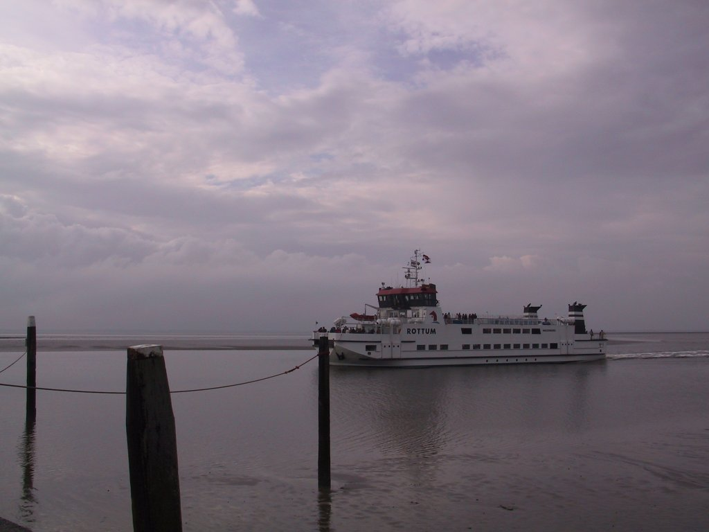 Waddenzee ferry Schiermonnikoog 'Rottum'